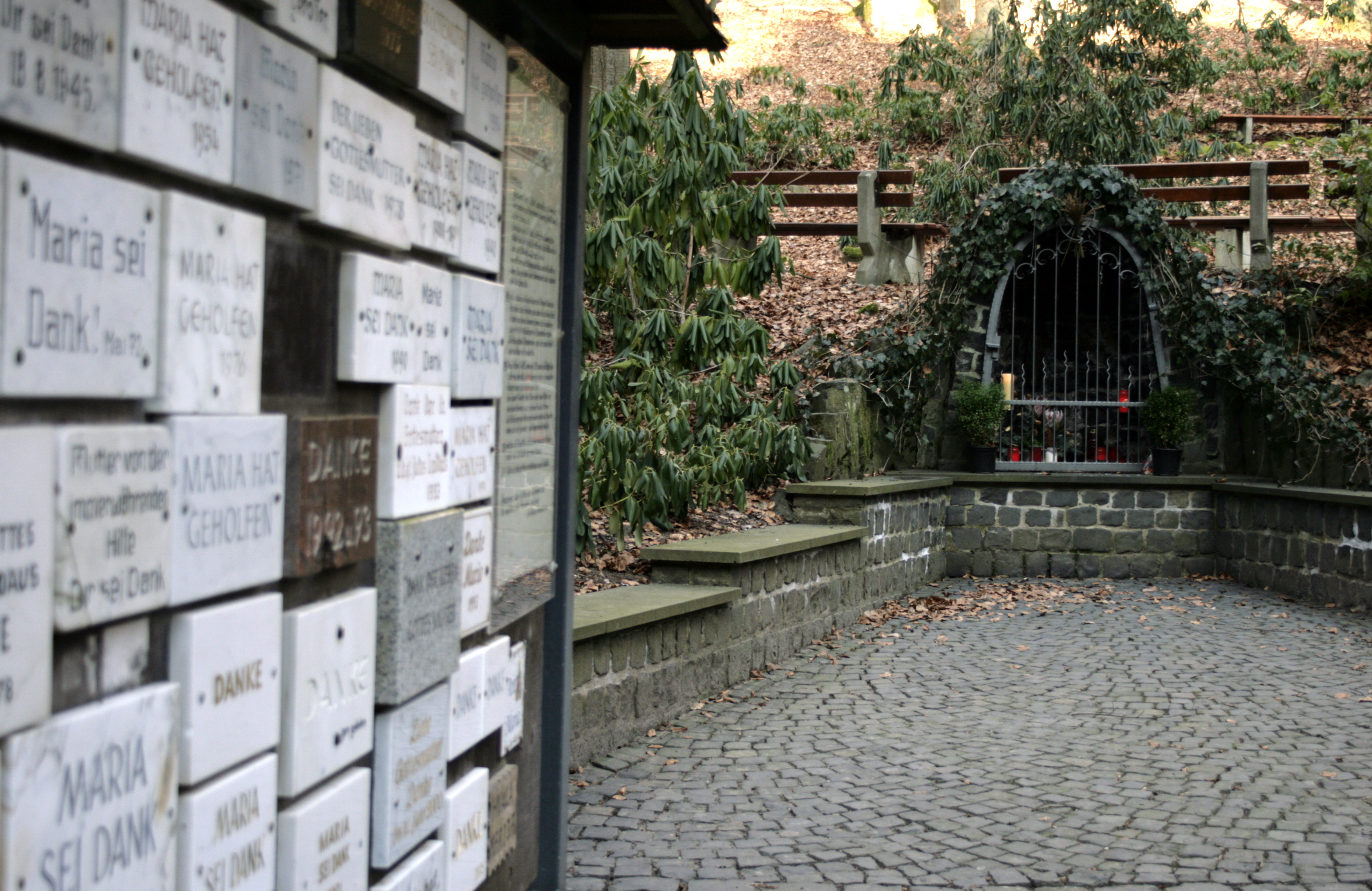 Brunnengrotte an der Wallfahrtsstätte "Sieben Schmerzen - Sieben Wunden" in Hadamar-Oberzeuzheim, Deutschland